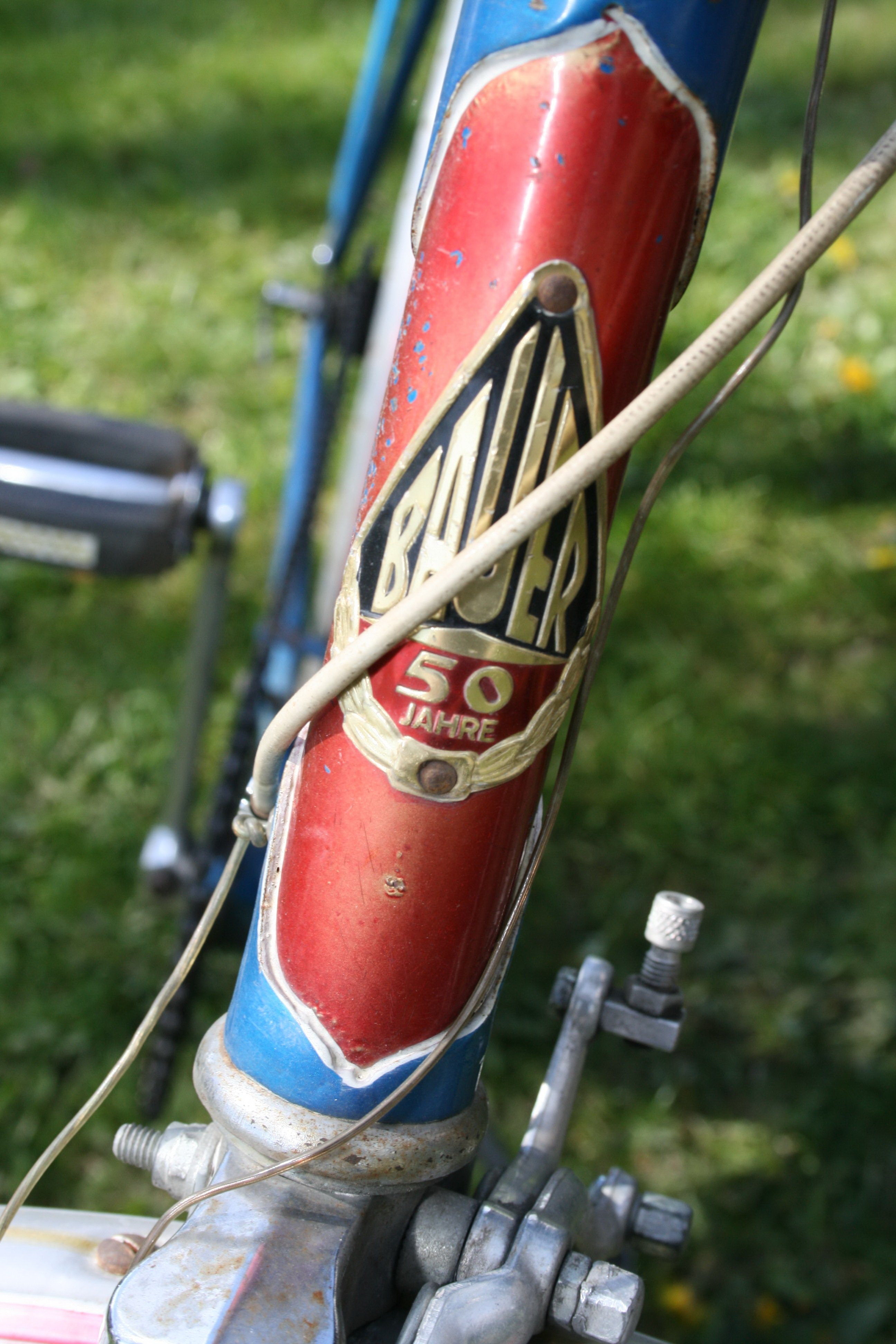 Detail eines Fahrradrahmens Fa. Bauer